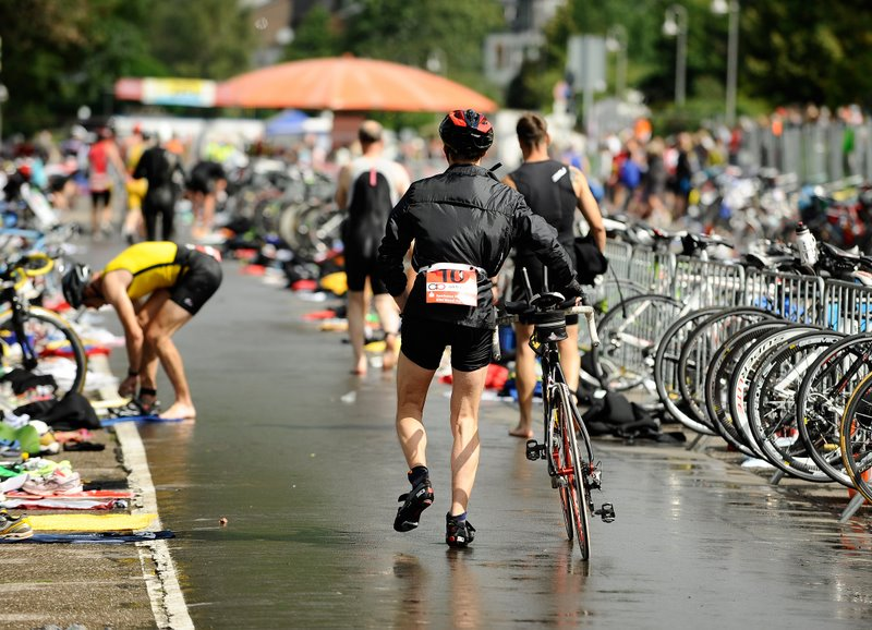 Mittelmosel Triathlon 2012